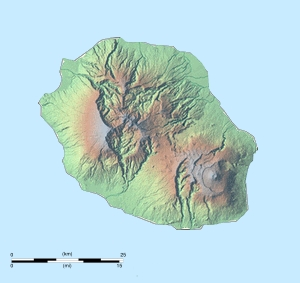 Carte de l'île de la Réunion, terrritoire français dans l'Océan Indien. La carte représente le découpage administratif des communes de l'île. Cette carte est un montage fait à partir d'une image sur commons